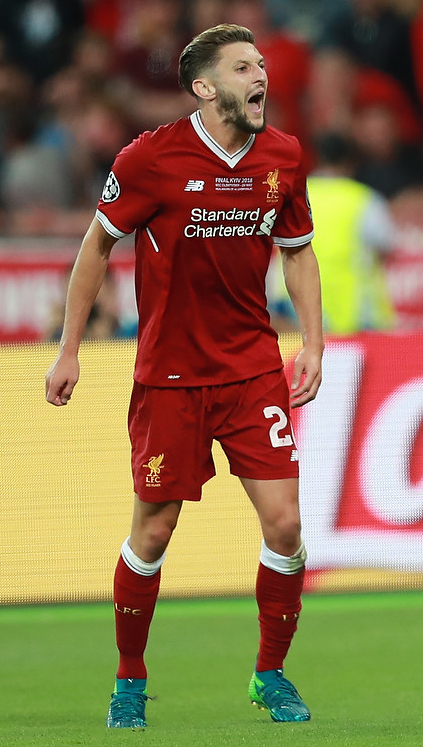 Финал ЛЧ в Киеве: 13-й кубок «Реала» и слёзы «Ливерпуля»